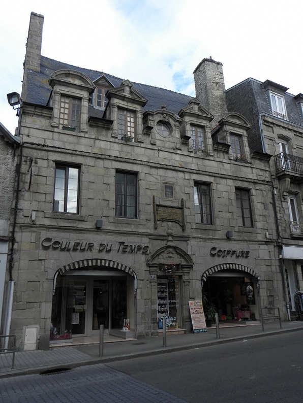 "Maison du Pilori", 30 Rue Général Leclerc à Saint-Pol-de-Léon (29). Edifiée en 1702, elle est surmontée d'un toit à deux demi-croupes qui évoquent un parcellaire ancien. La réunion de deux parcelles a permis la construction d'une maison double.